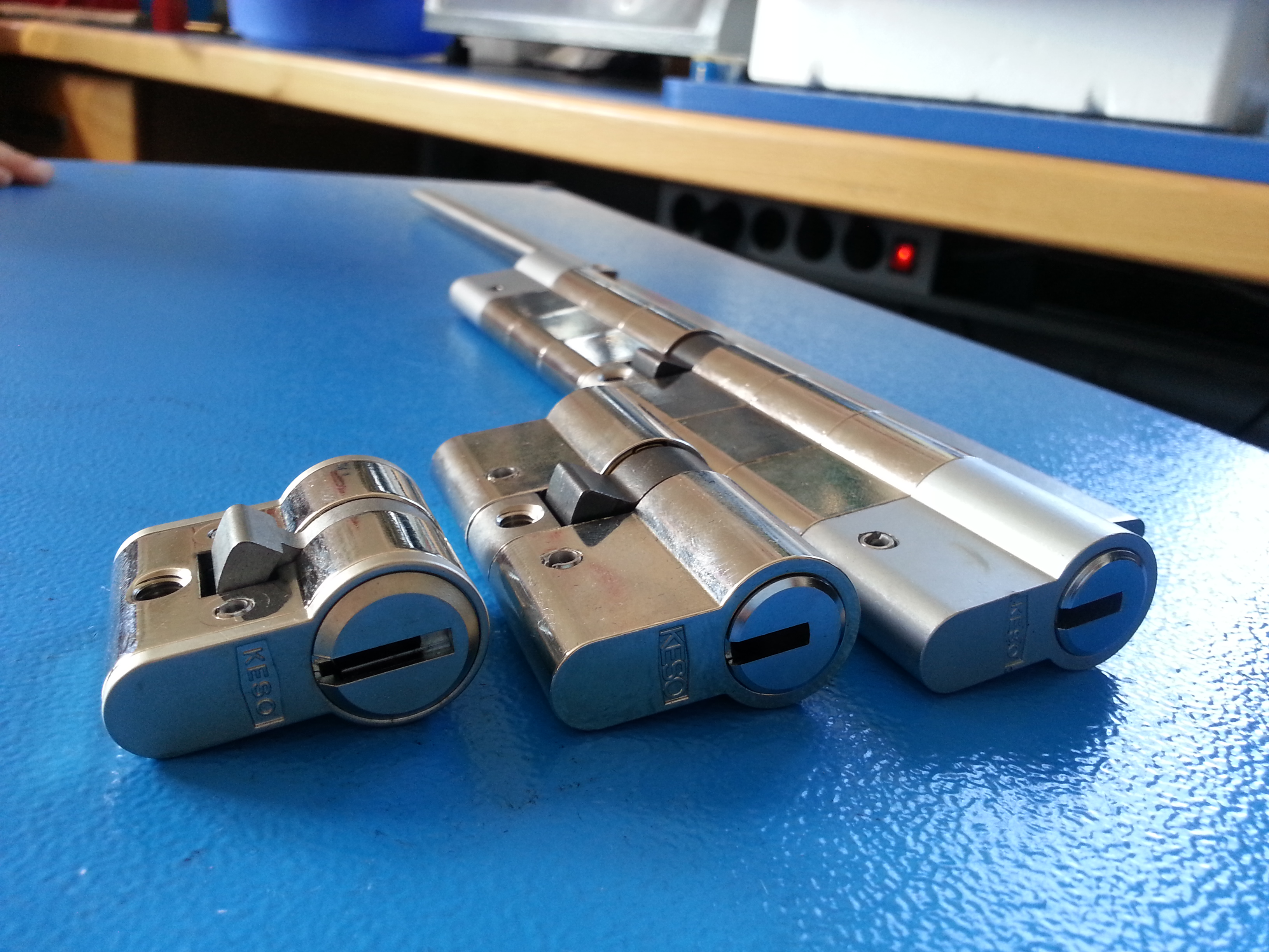 Cilindrične vložke keso je mogoče prilagajati različnim dimenzijam vrat.